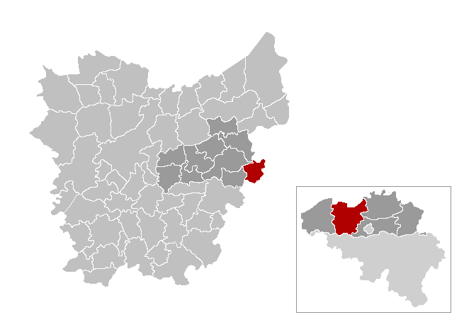 Gemeentekaart, eigen werk Categorie:Kaart met locatie Belgische gemeente